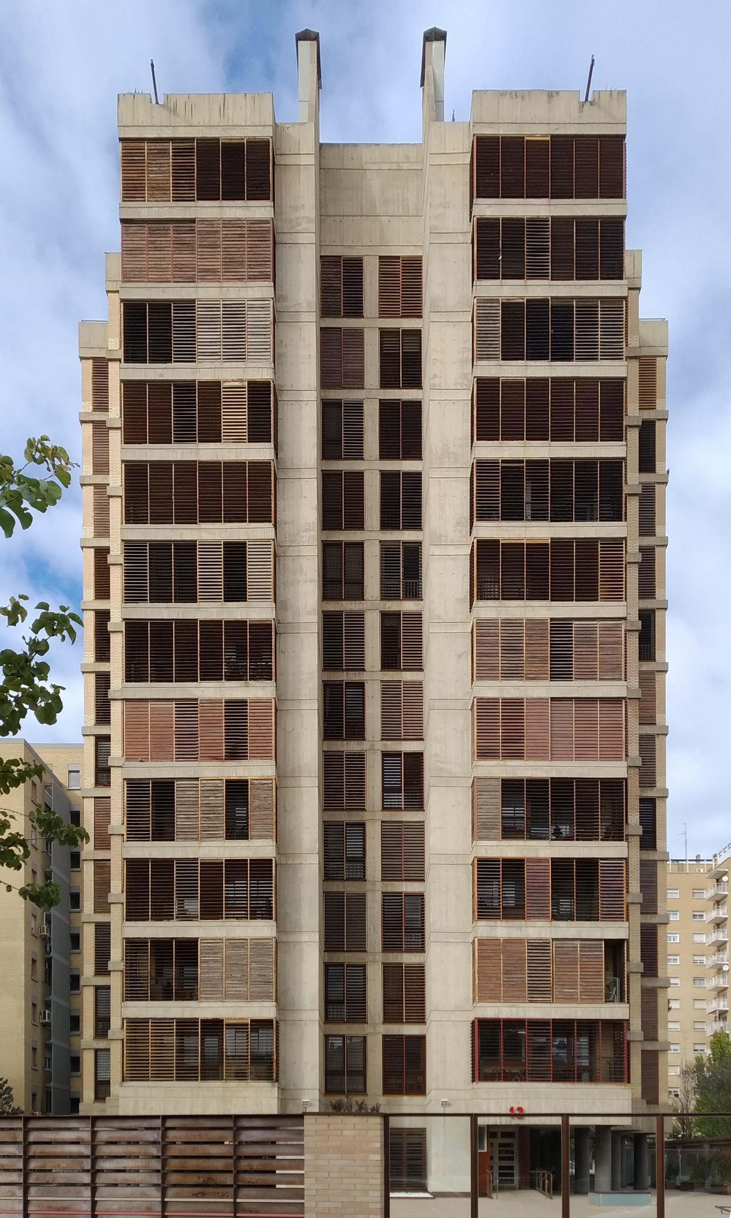 Edificio obra de José Romero y Saturnino Cisneros, situado en C: Isabel La Católica 12 de Zaragoza (España), de 1970.